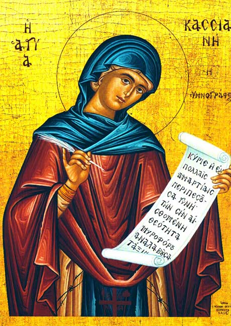 Icono antiguo representando a Santa Kassiana, o Kassia, poetisa y compositora del Siglo VIII en Bizancio